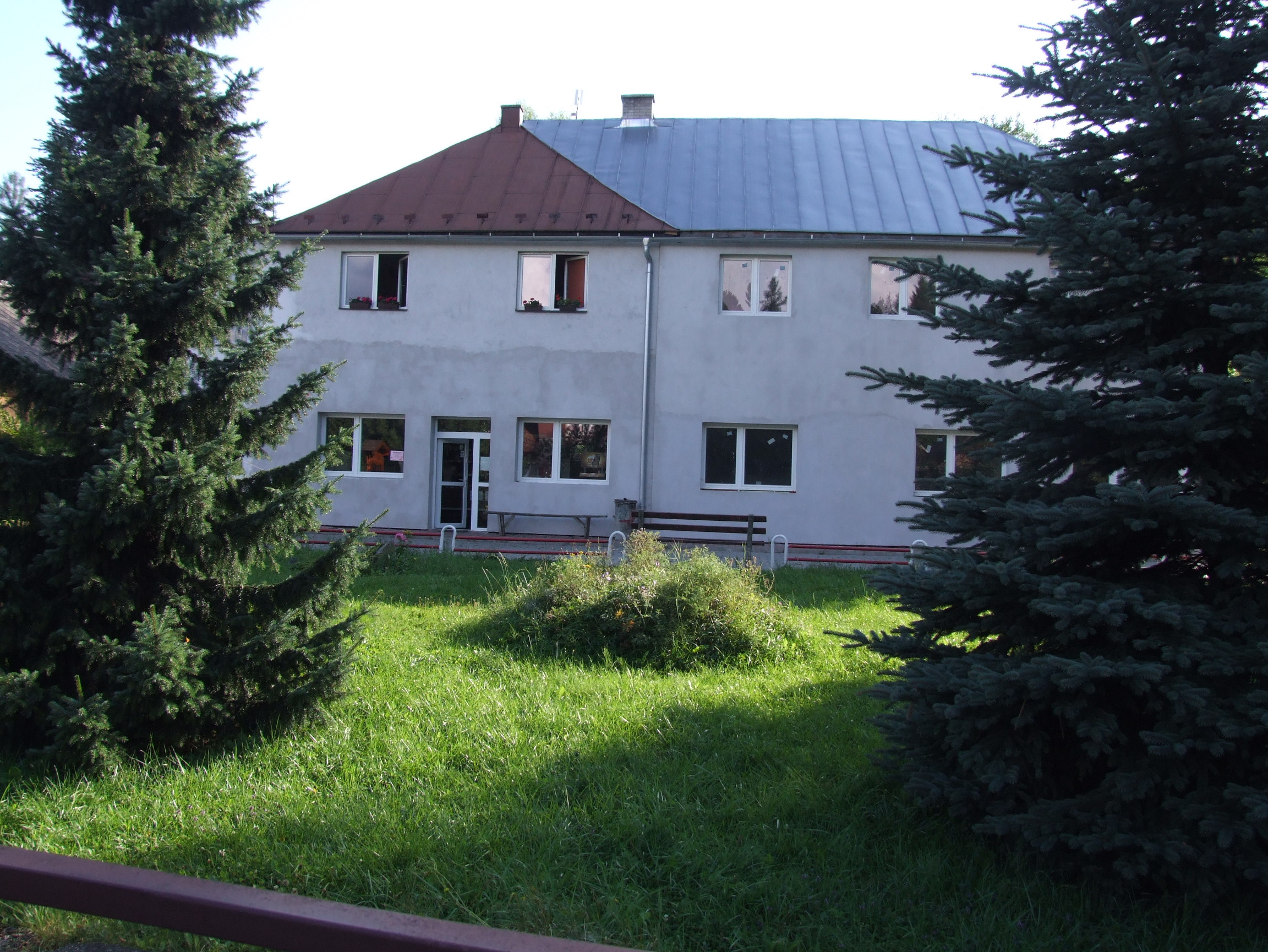 Ižipovce (szkoła podstawowa)